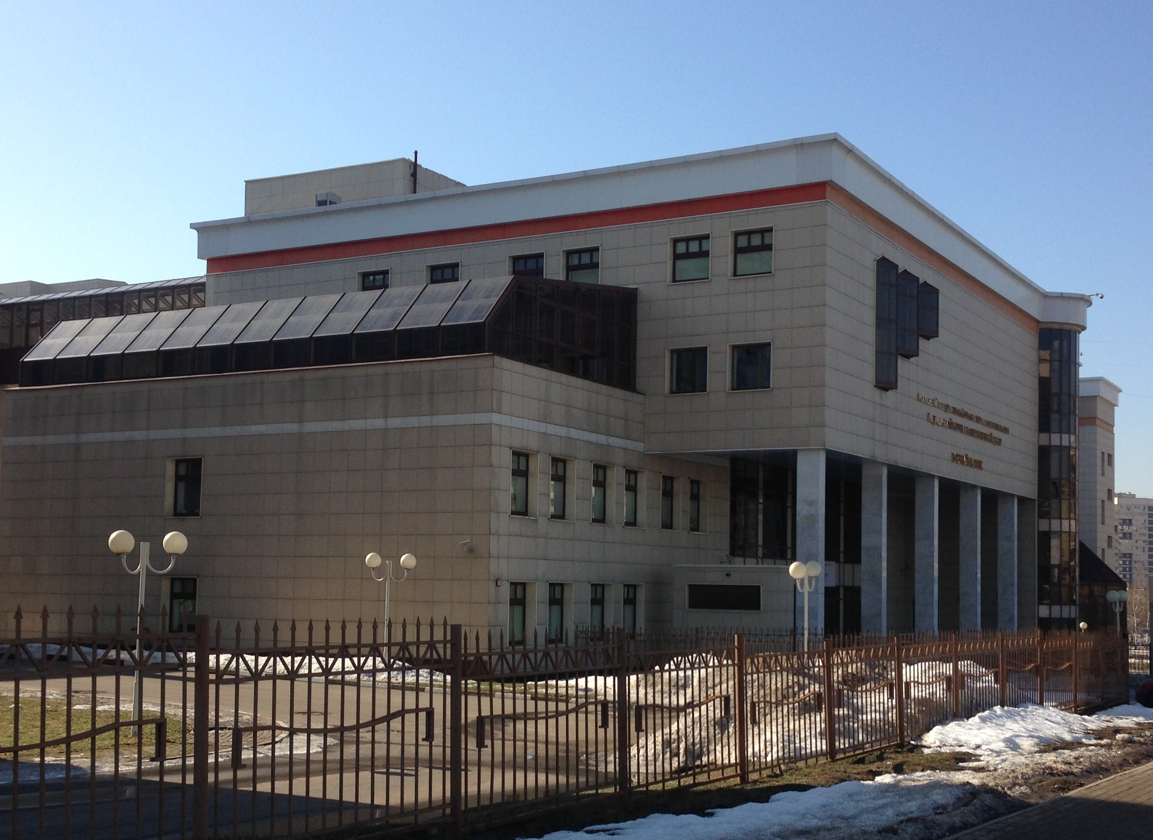 Факультет фундаментальной медицины МГУ